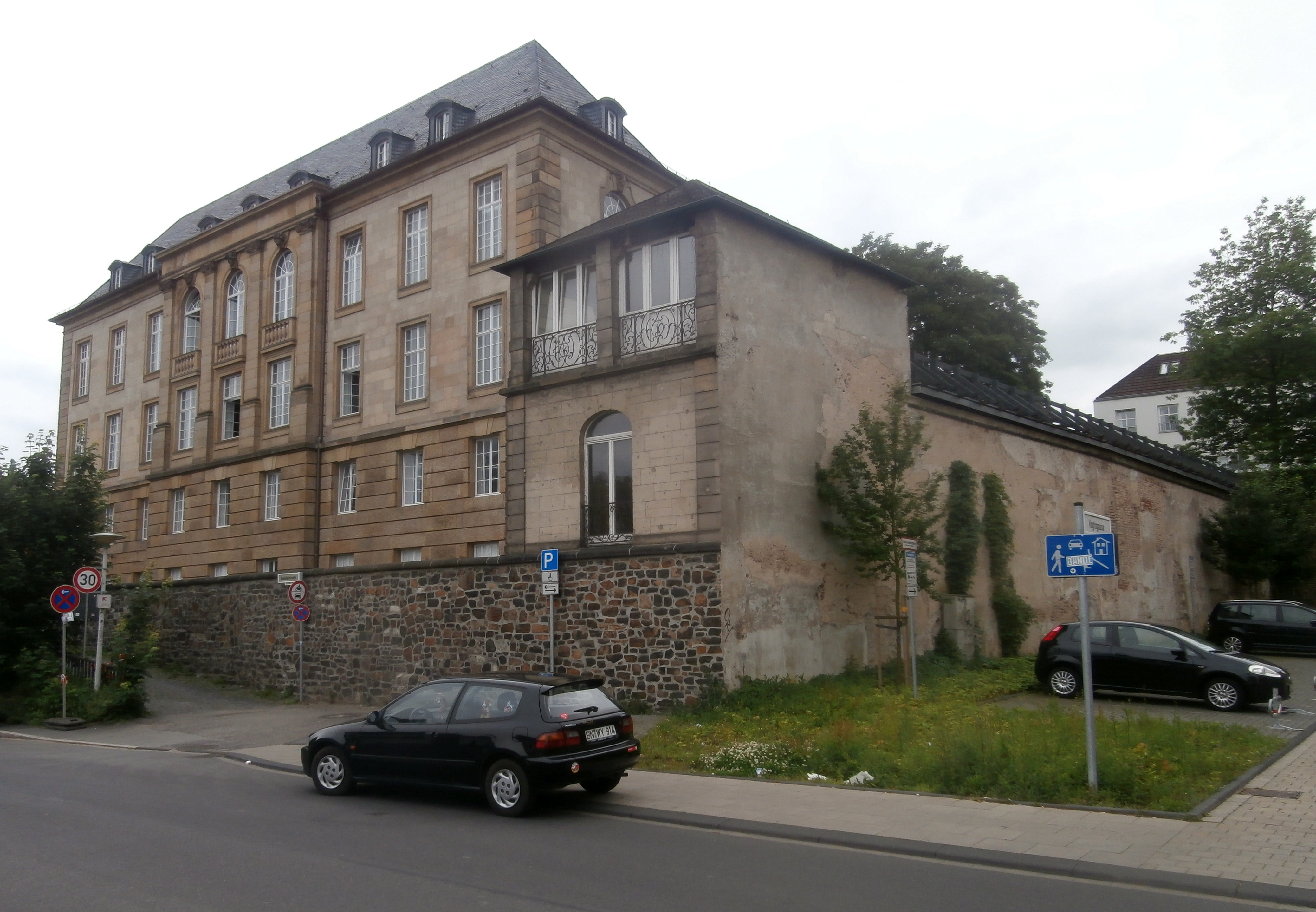 Ehemaliges Oberbergamt Bonn, Konviktstraße 11, Bonn-Zentrum: Ansicht vom Brassertufer